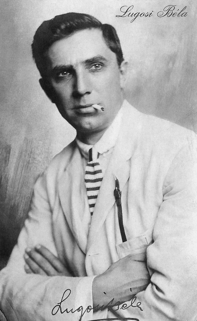 Lugosi Béla színművész.